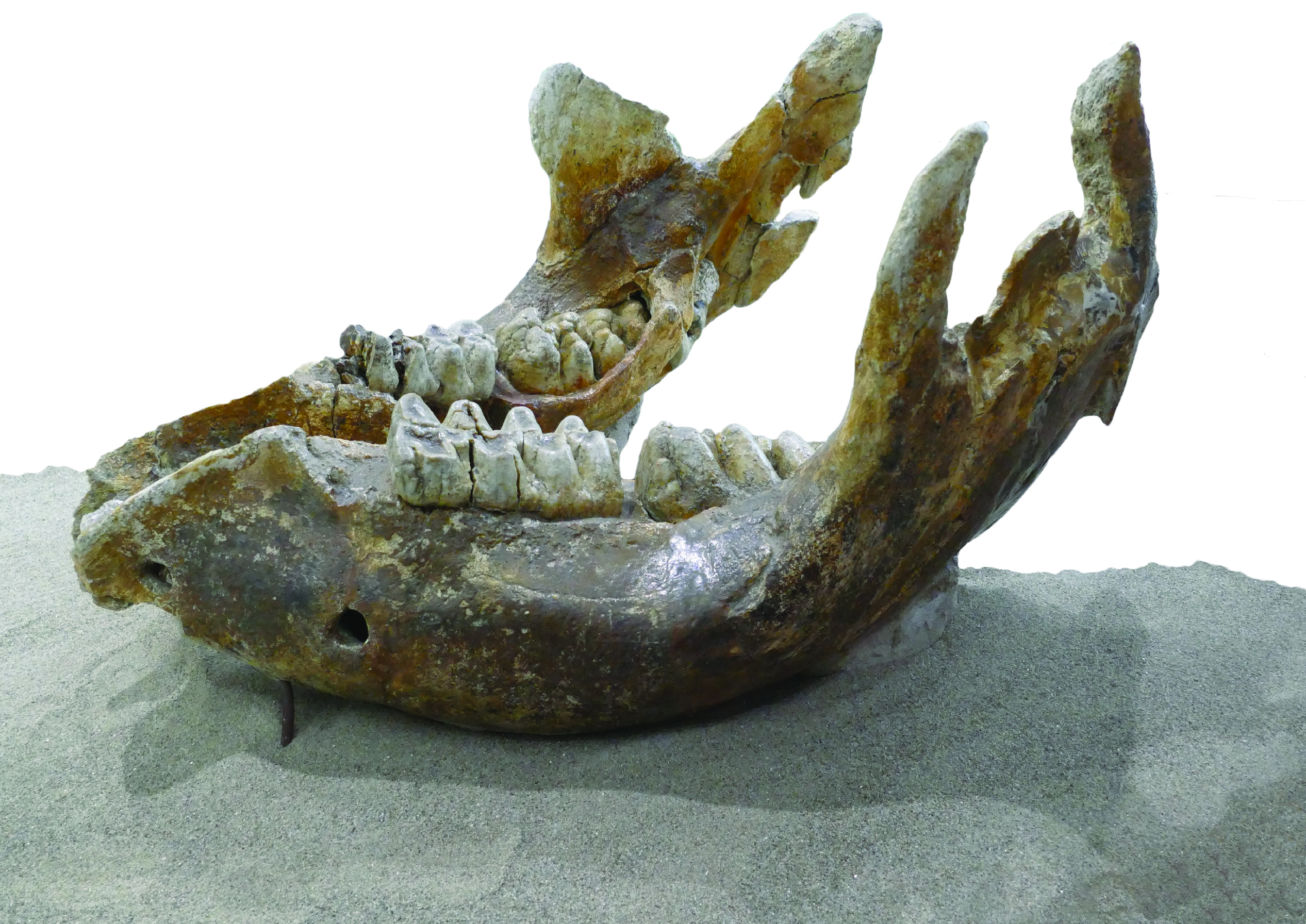 Paleontologický nález